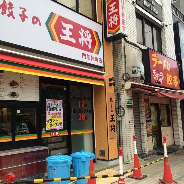 餃子戦争の勃発